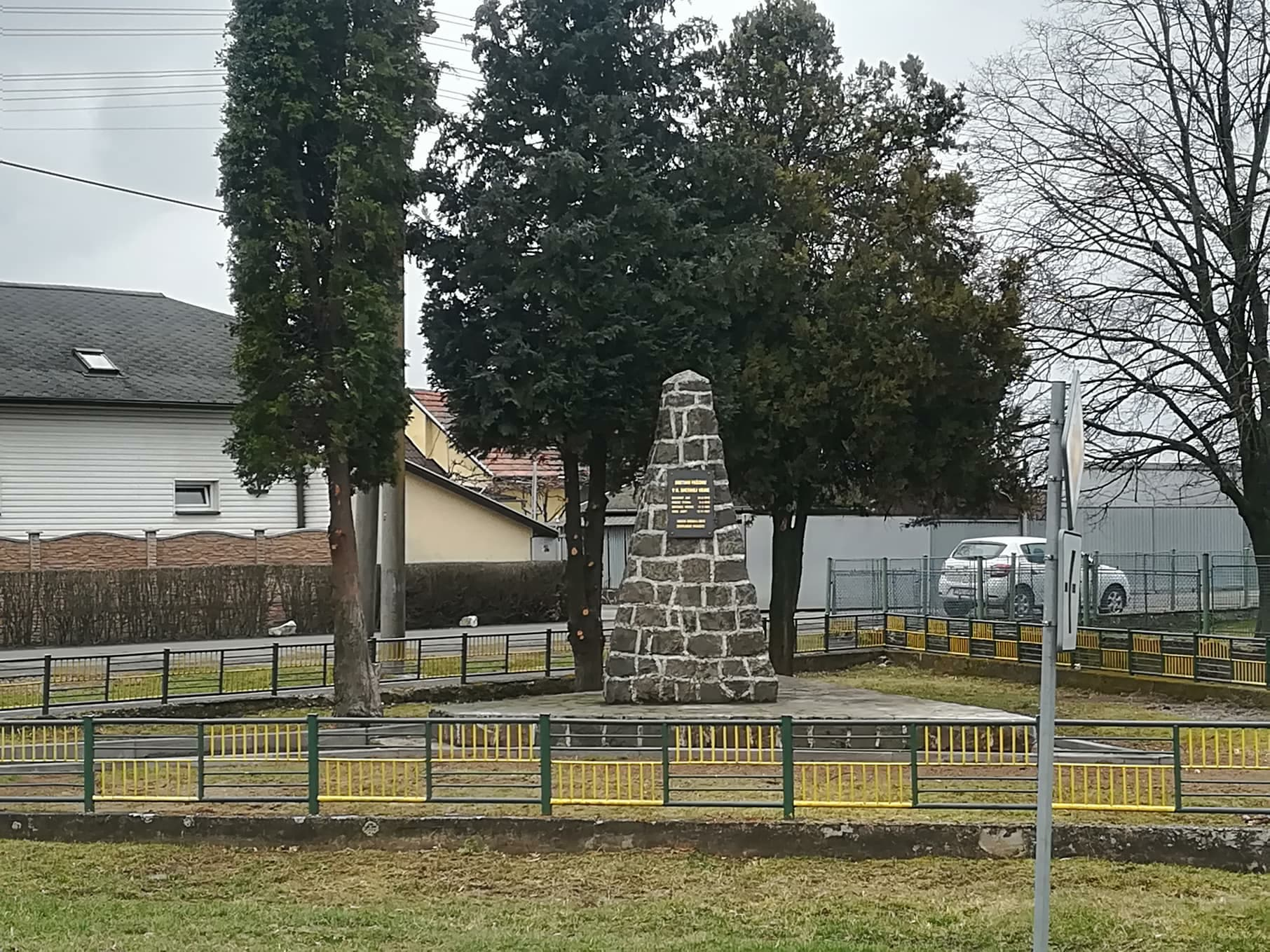 Padlým sovietkym vojakom pamätník